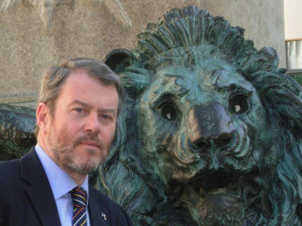 Ettore Beggiatto am Campo Manin, ein Platz in Venedig (Venezia)